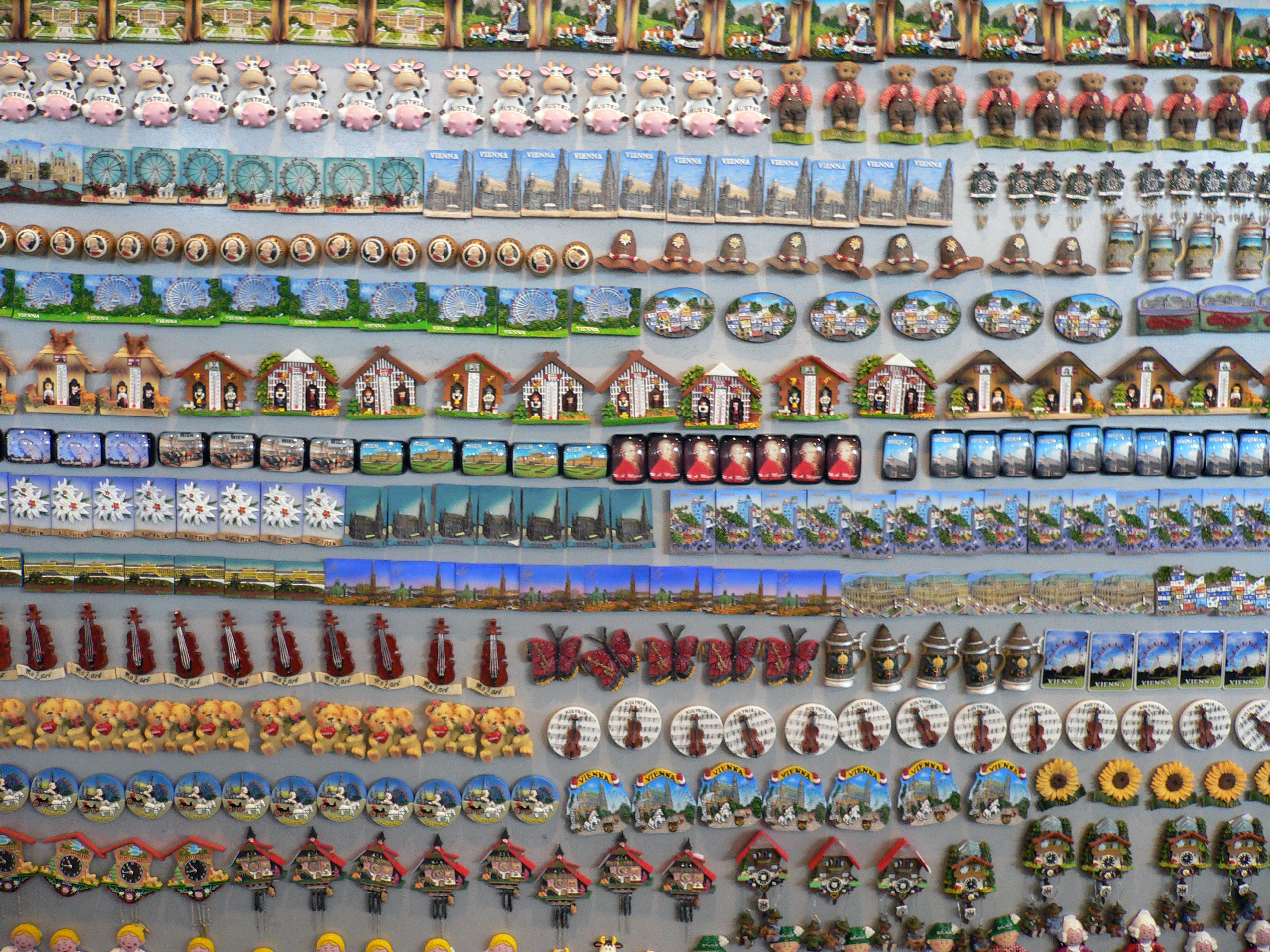 blogged